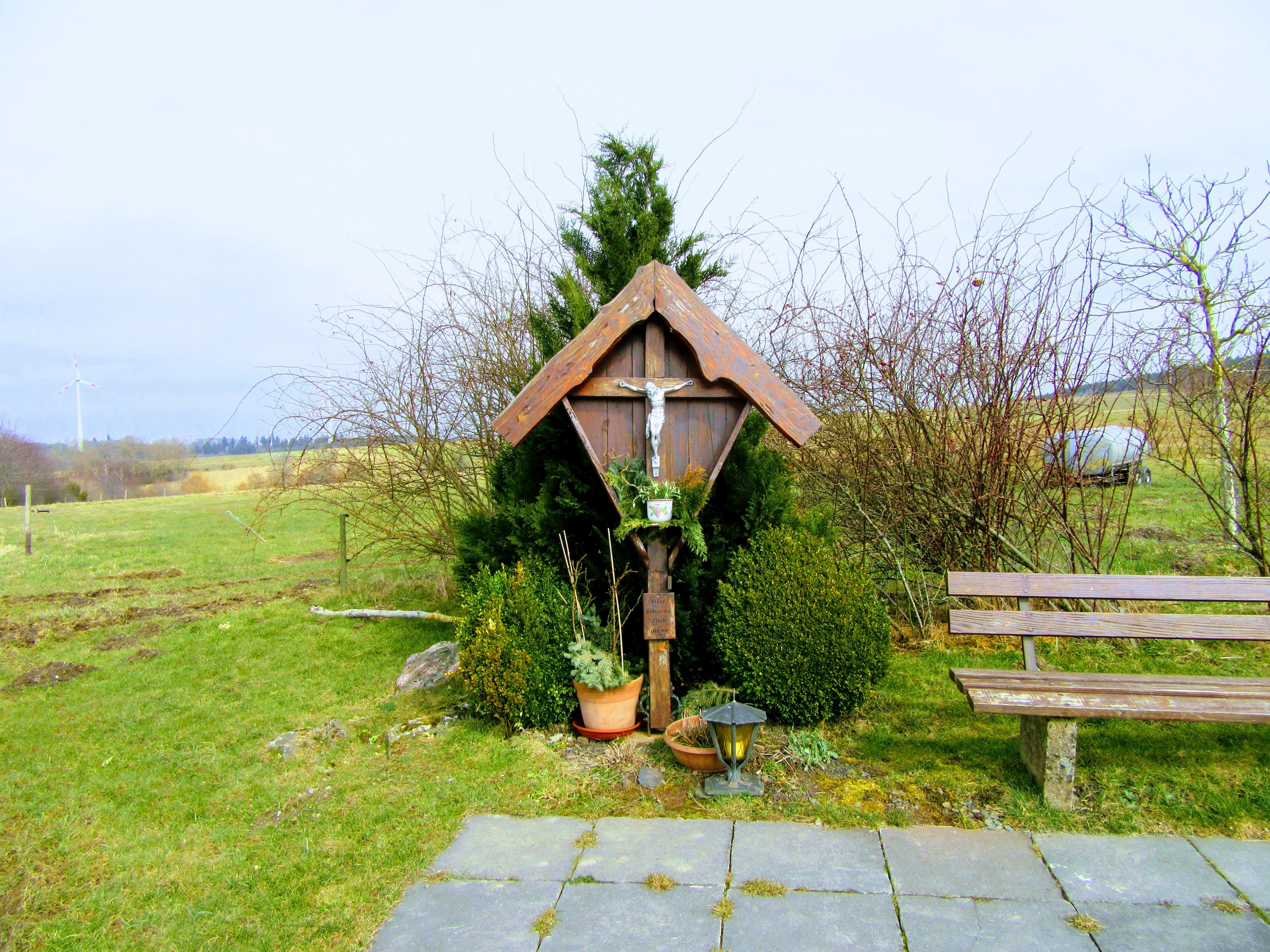 Feldkreuz bei Meirath (Lorscheid), Landkreis Trier-Saarburg